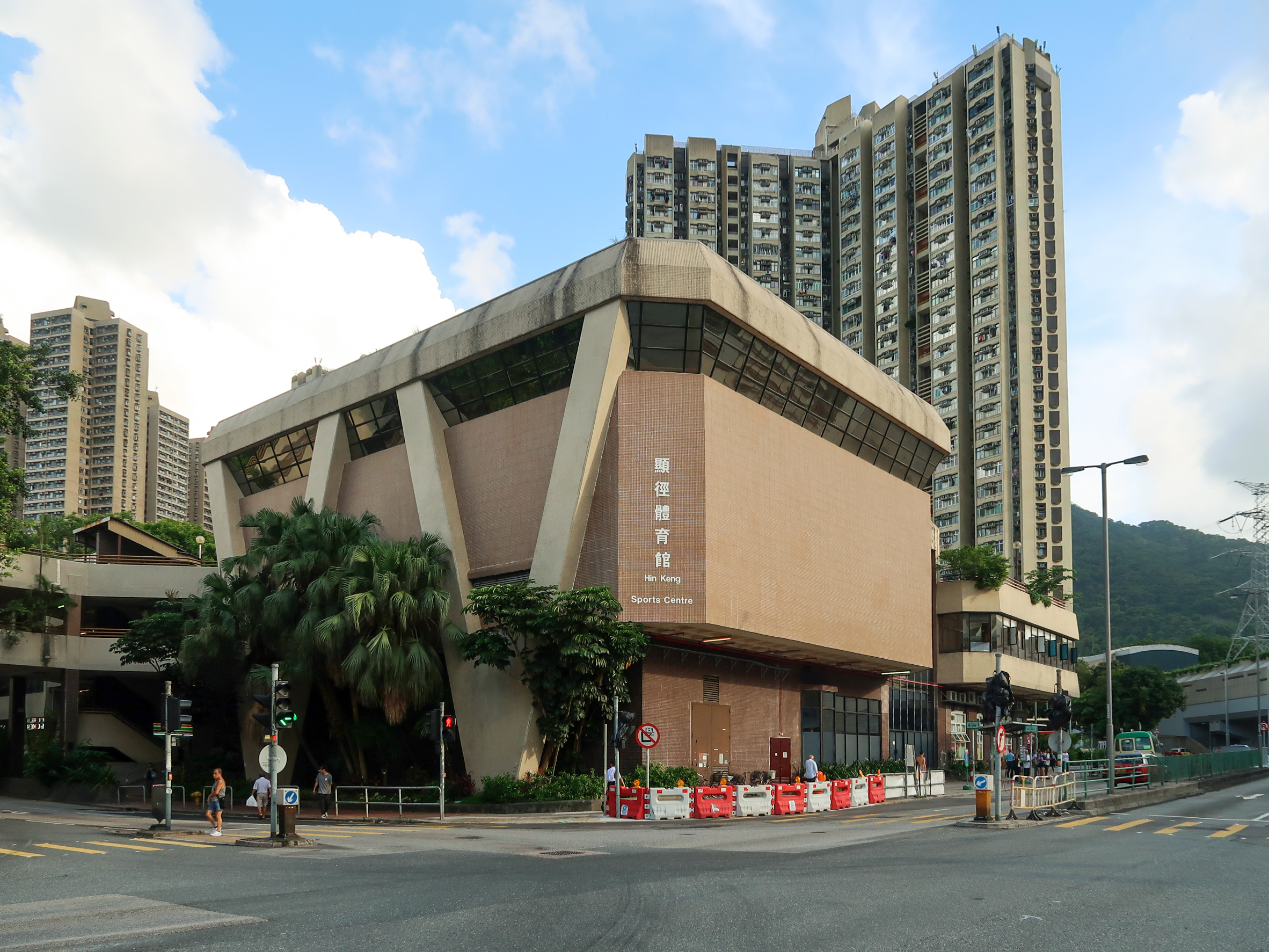 Hin Keng Sport Centre